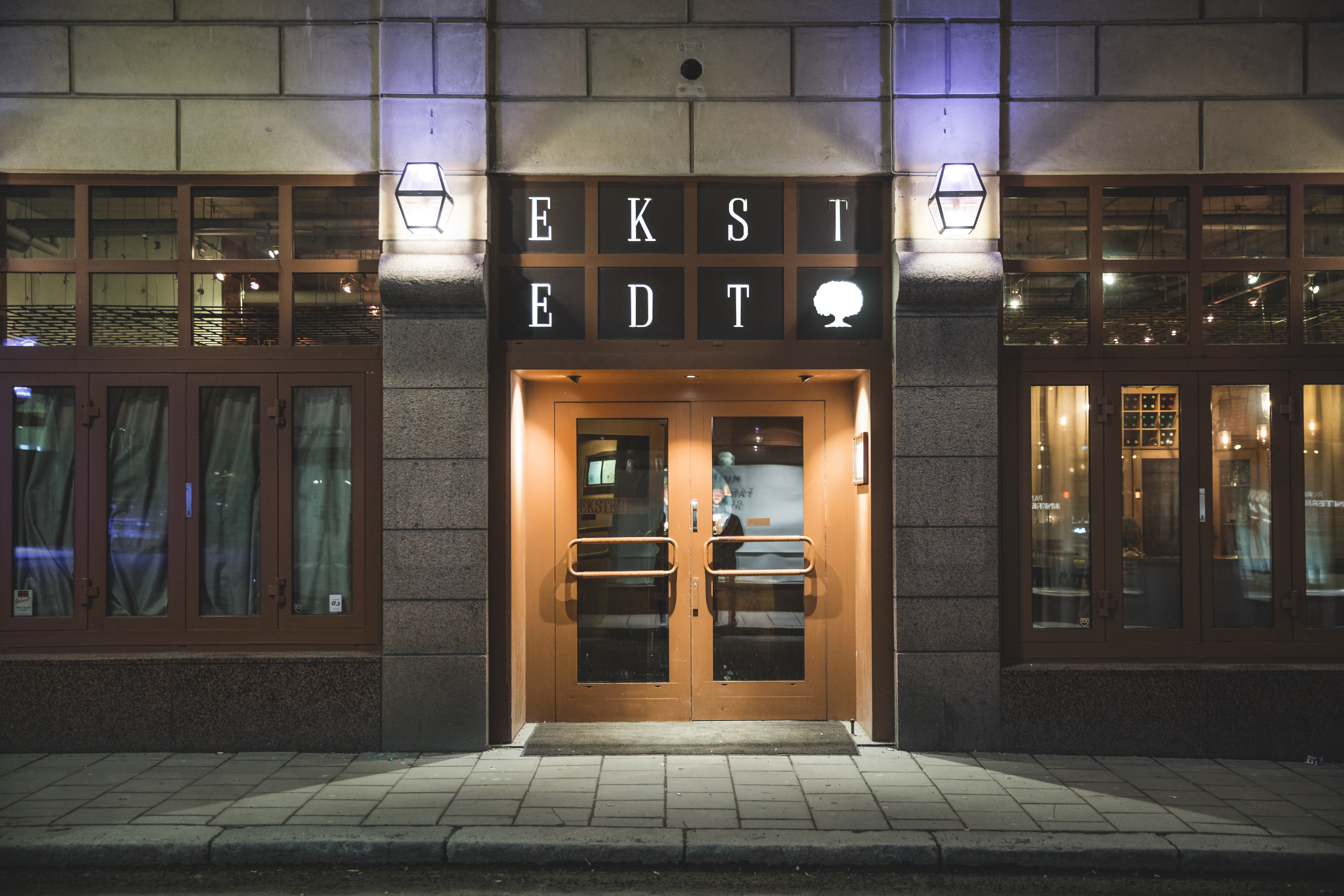 AV4A6593